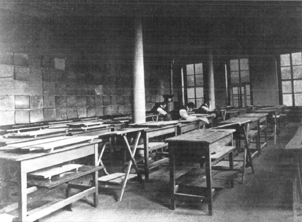 Polytechnische School te Delft, tekenlokaal 1895